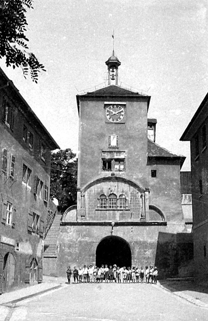 Festung Hohenasperg: Innerer Torturm von 1535, Foto vom Donnerstag den 11. Juni 1925 mit einer Schulklasse aus Bietigheim beim Jahresausflug